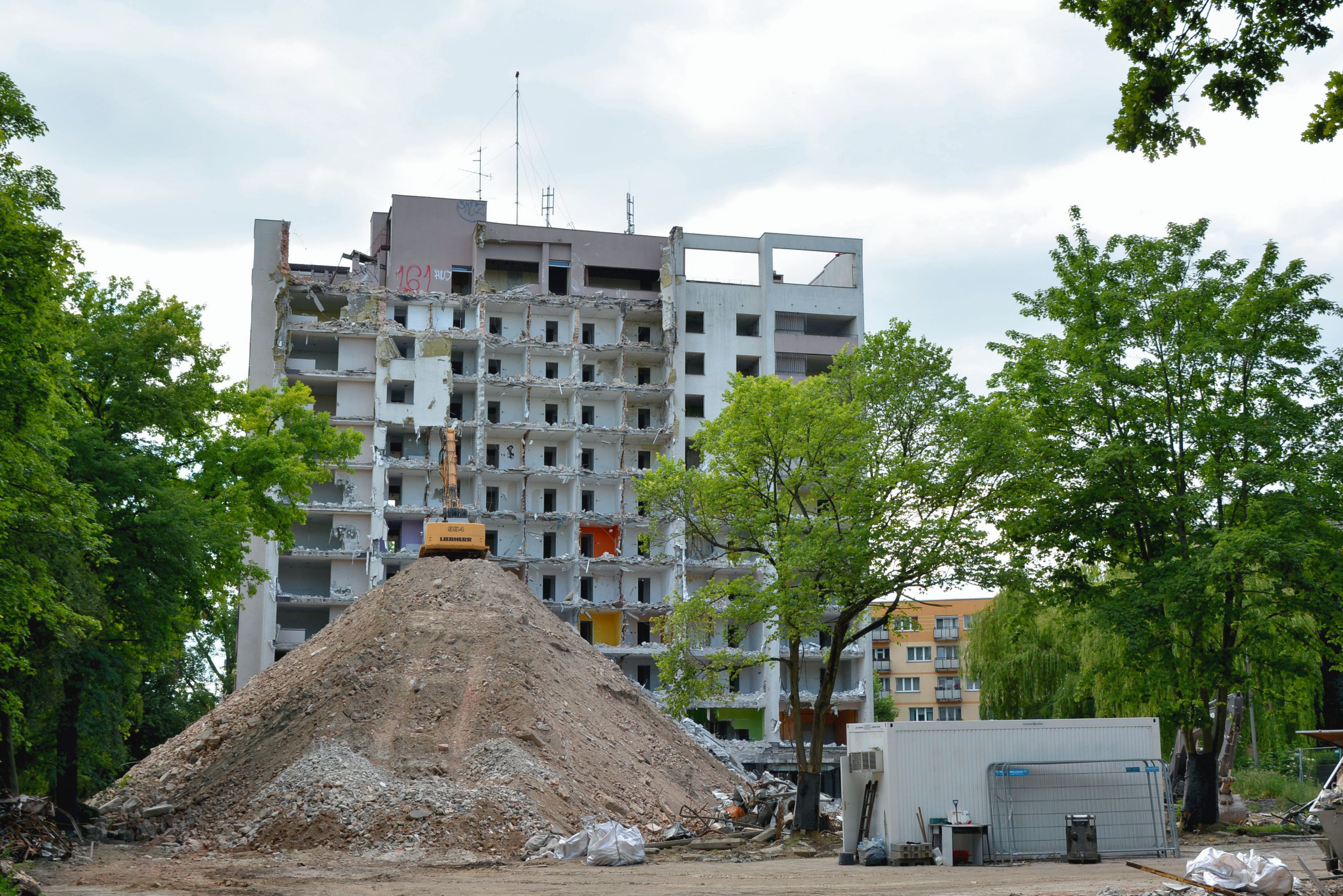 Rozbiórka Domu Marynarza w Szczecinie